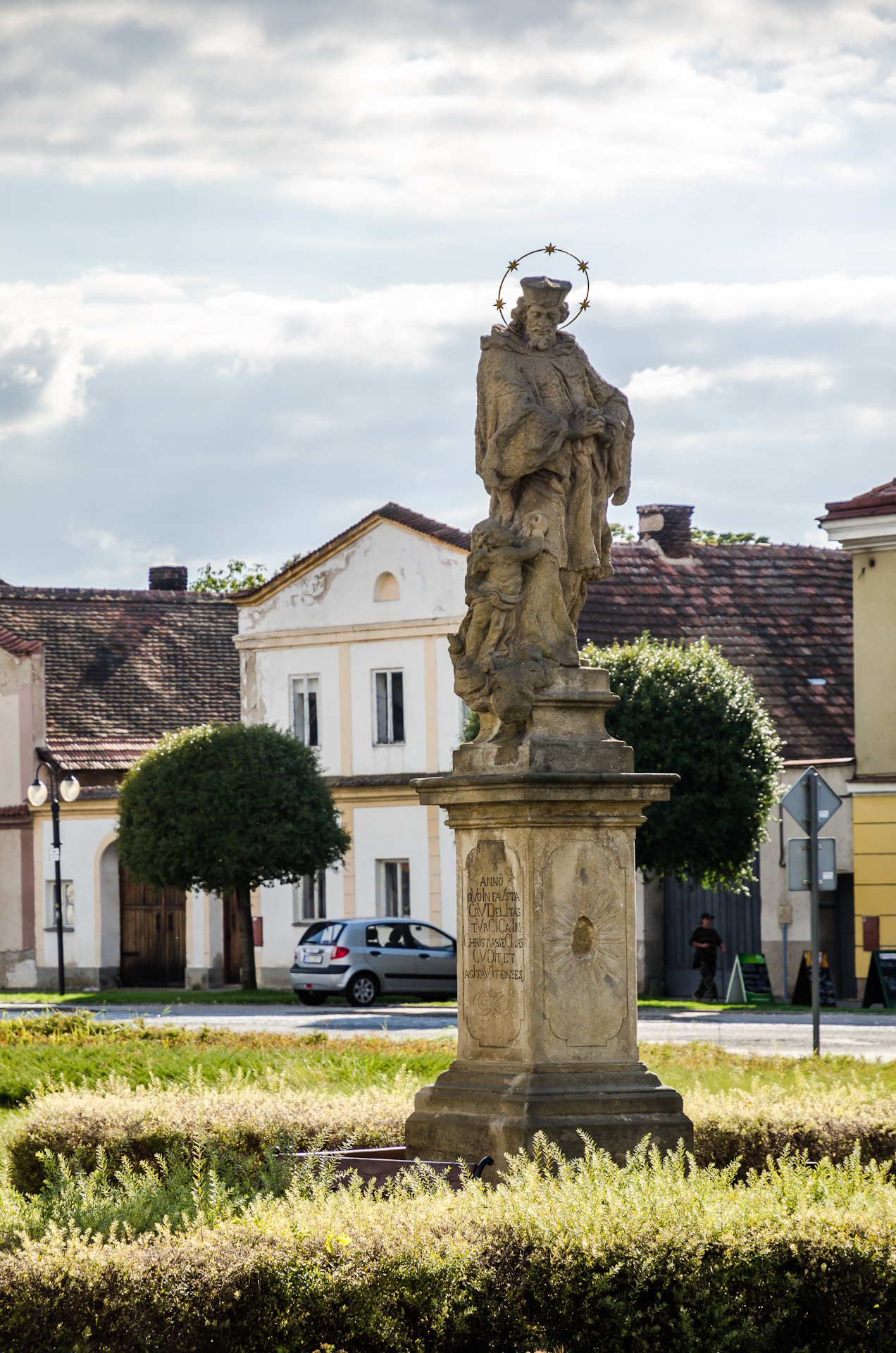 Socha sv. Jana Nepomuckého (Dašice), nám. T. G. Masaryka, Dašice